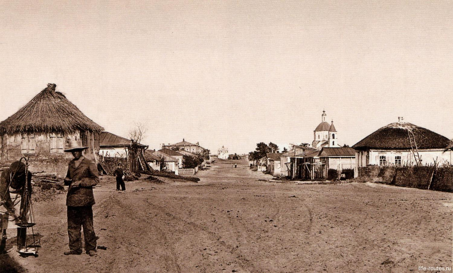 Станица Вешенская в 1904 году, Ростовская область РФ